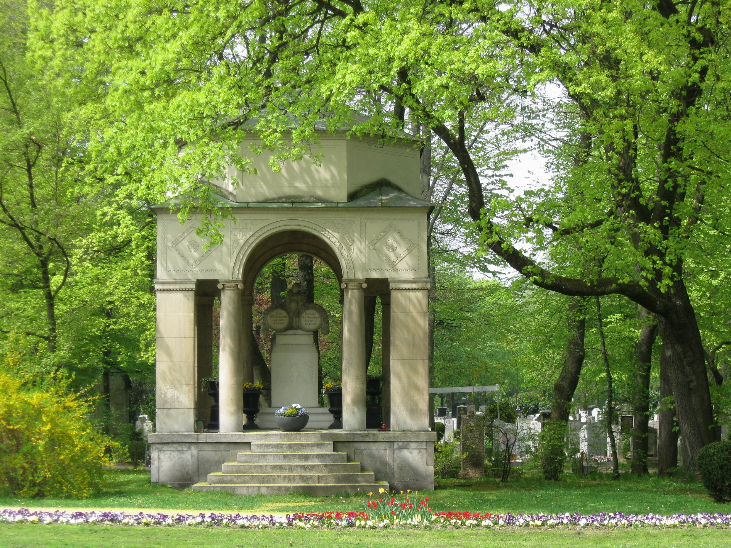 Moshammer-Mausoleum im Ostfriedhof, München